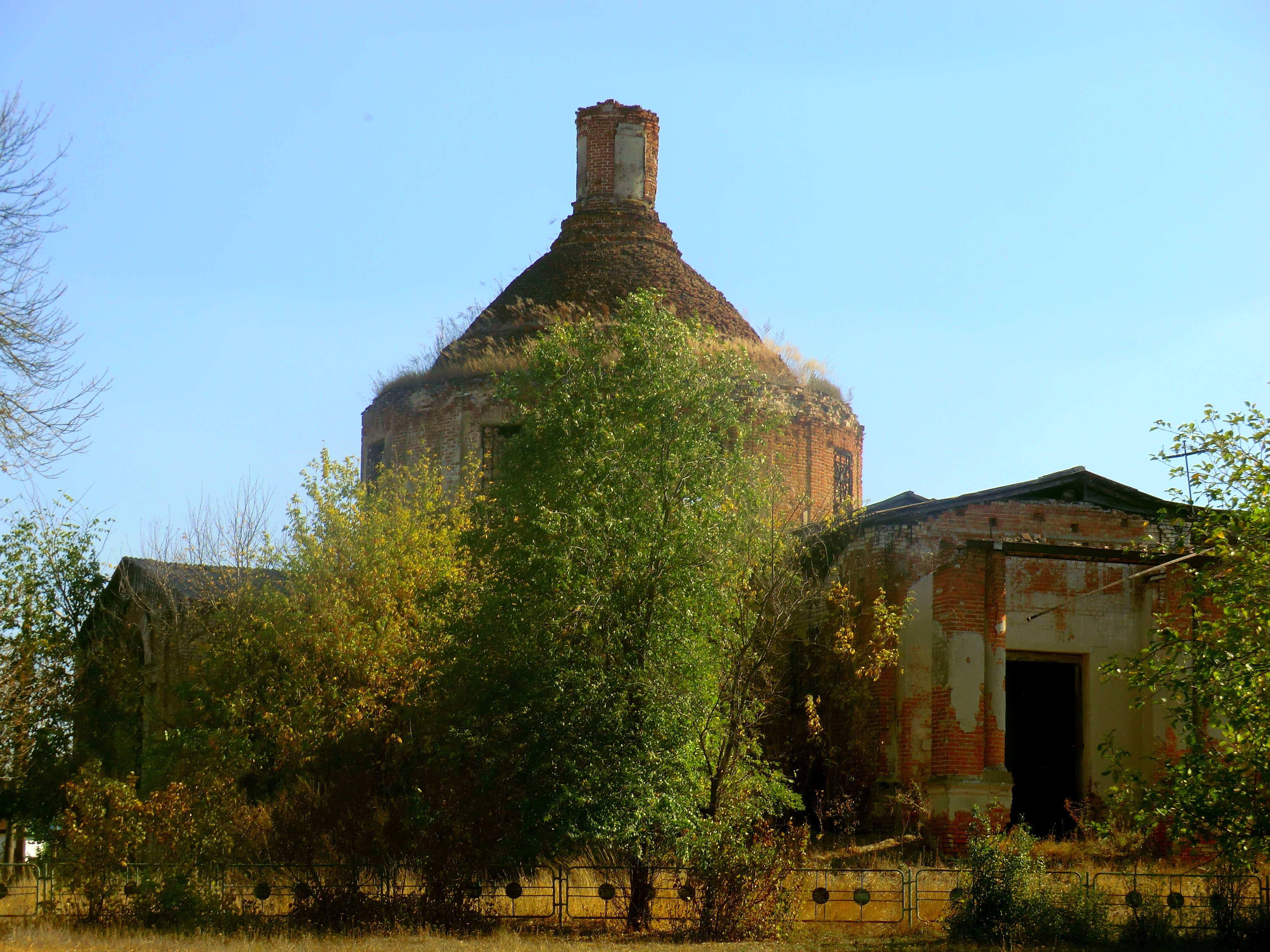 CIMG5842